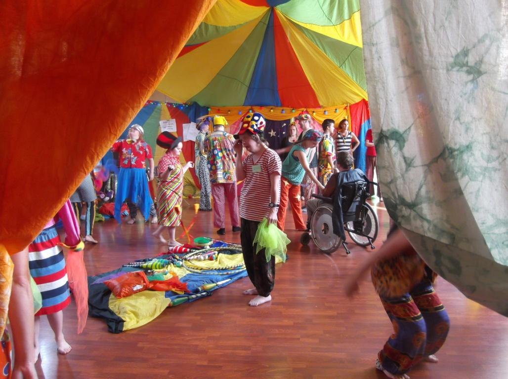 Maarjaküla